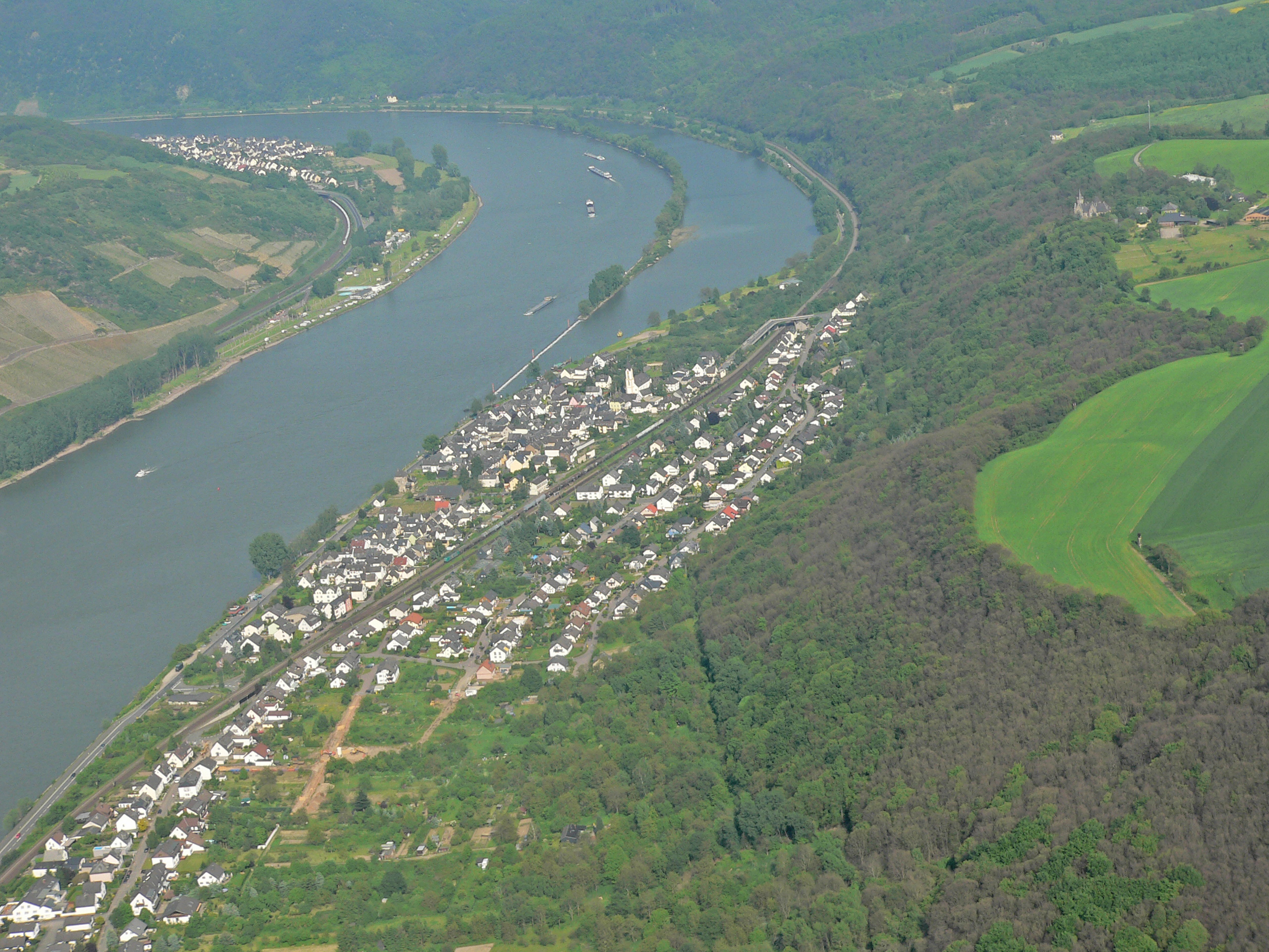 Luftaufnahme von Filsen, Osterspai, Boppard